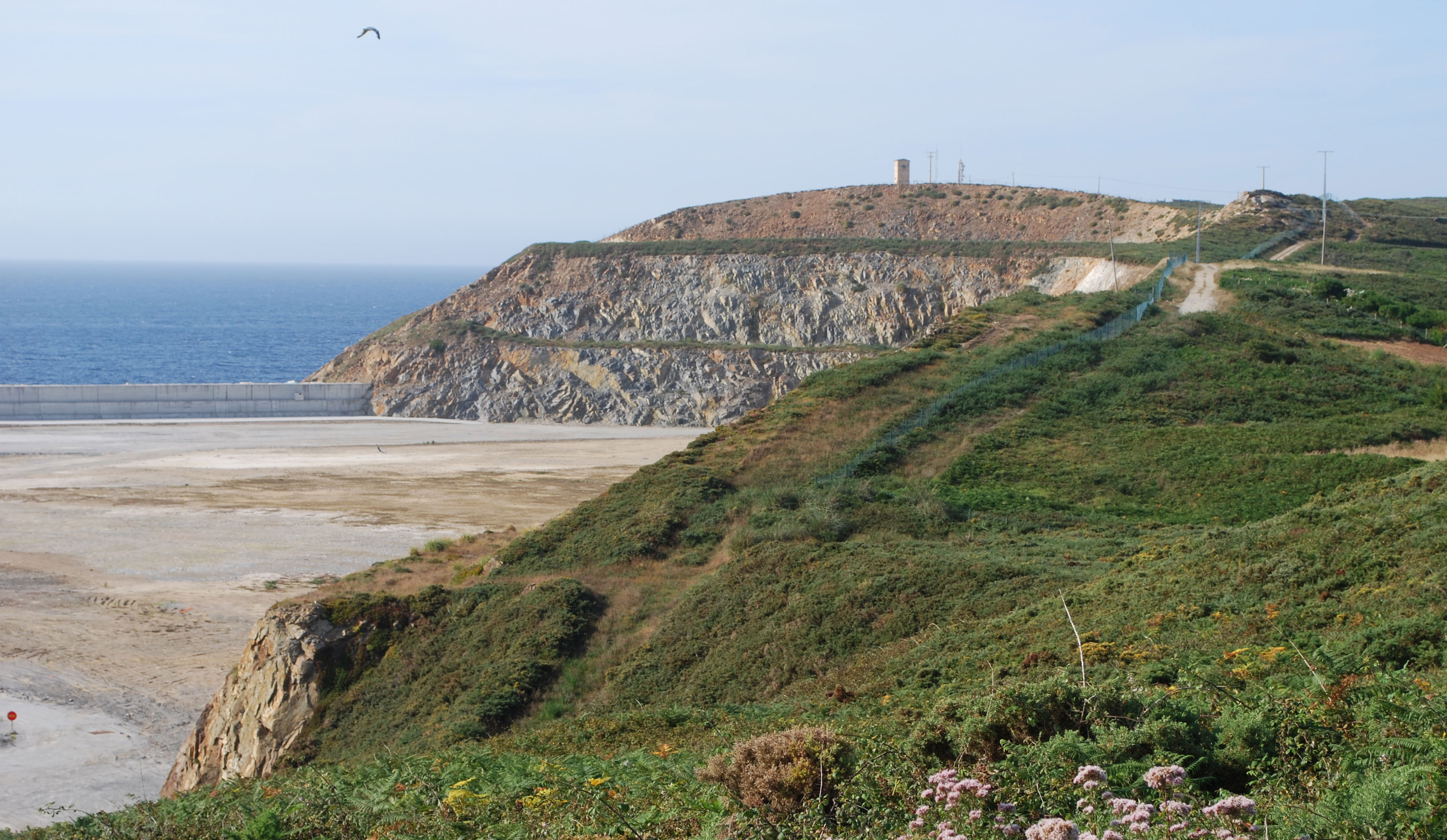 Tallada no monte onde estaba o castro de cociñadoiro Arteixo Punta Langosteira, Porto Exterior da Coruña Galiza Spain